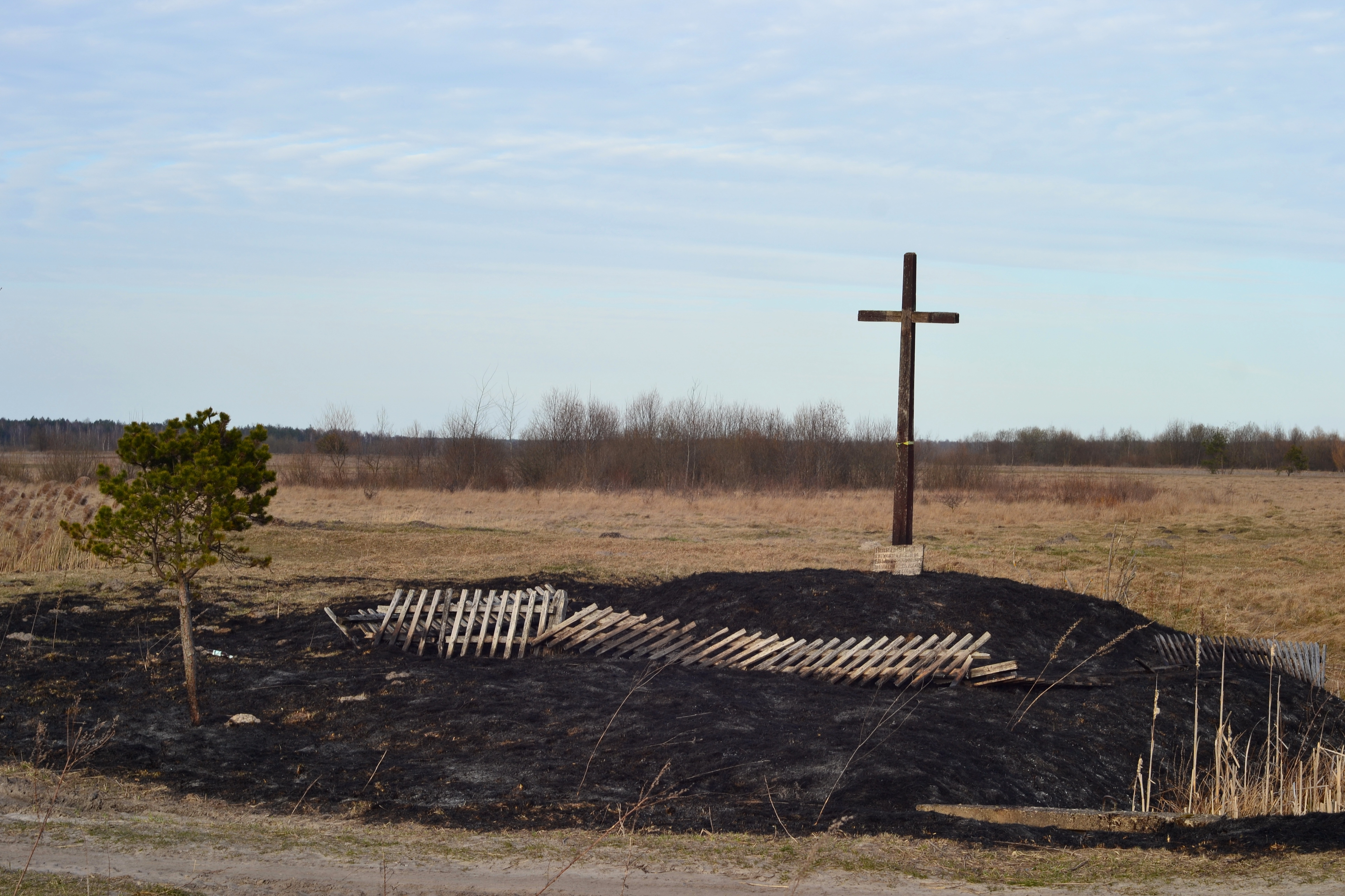 Могила братська 14 воїнів УПА, які загинули у бою з німцями (в тому числі – і з с. Ситниця) - загальний вигляд - Велика Яблунька (за 0,8 км на південь від тракторної бригади у полі) Маневицький район Волинська область Україна